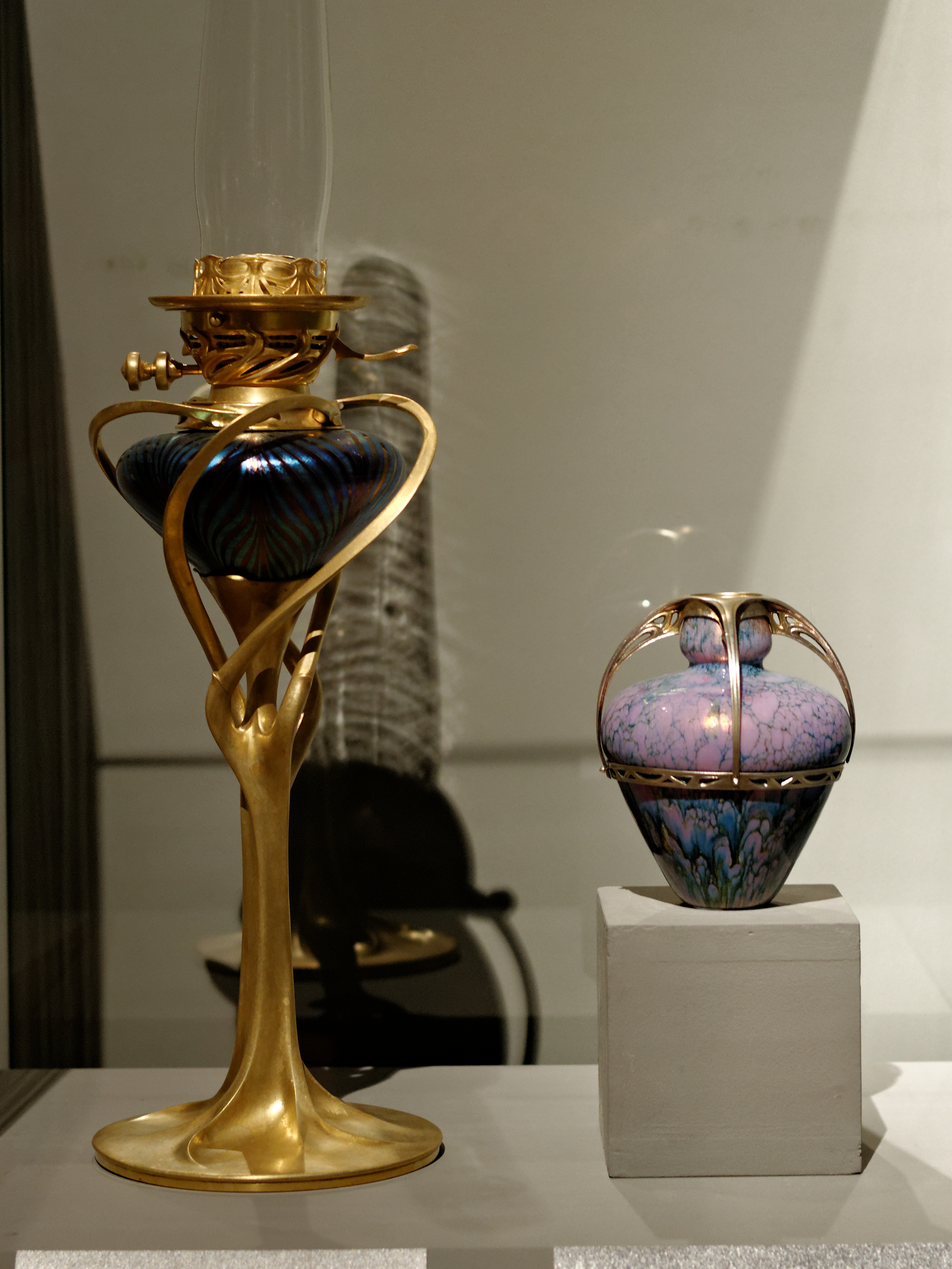 Lampes à pétrole, Anthony Selmersheim (1871-1971). Paris, c 1898